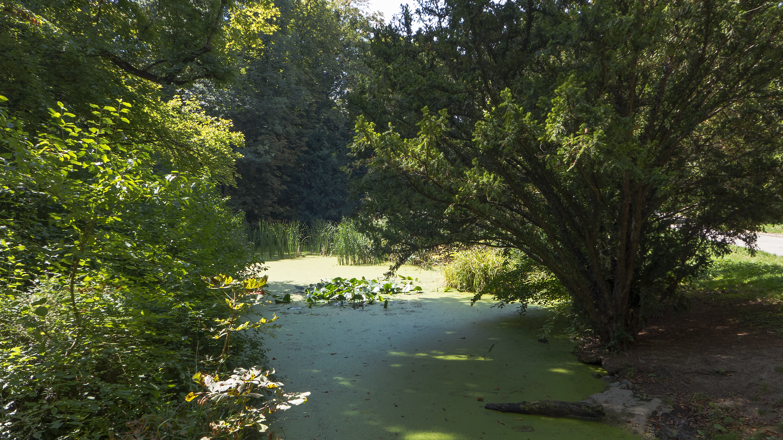 Wertheimsteinpark in Wien 19